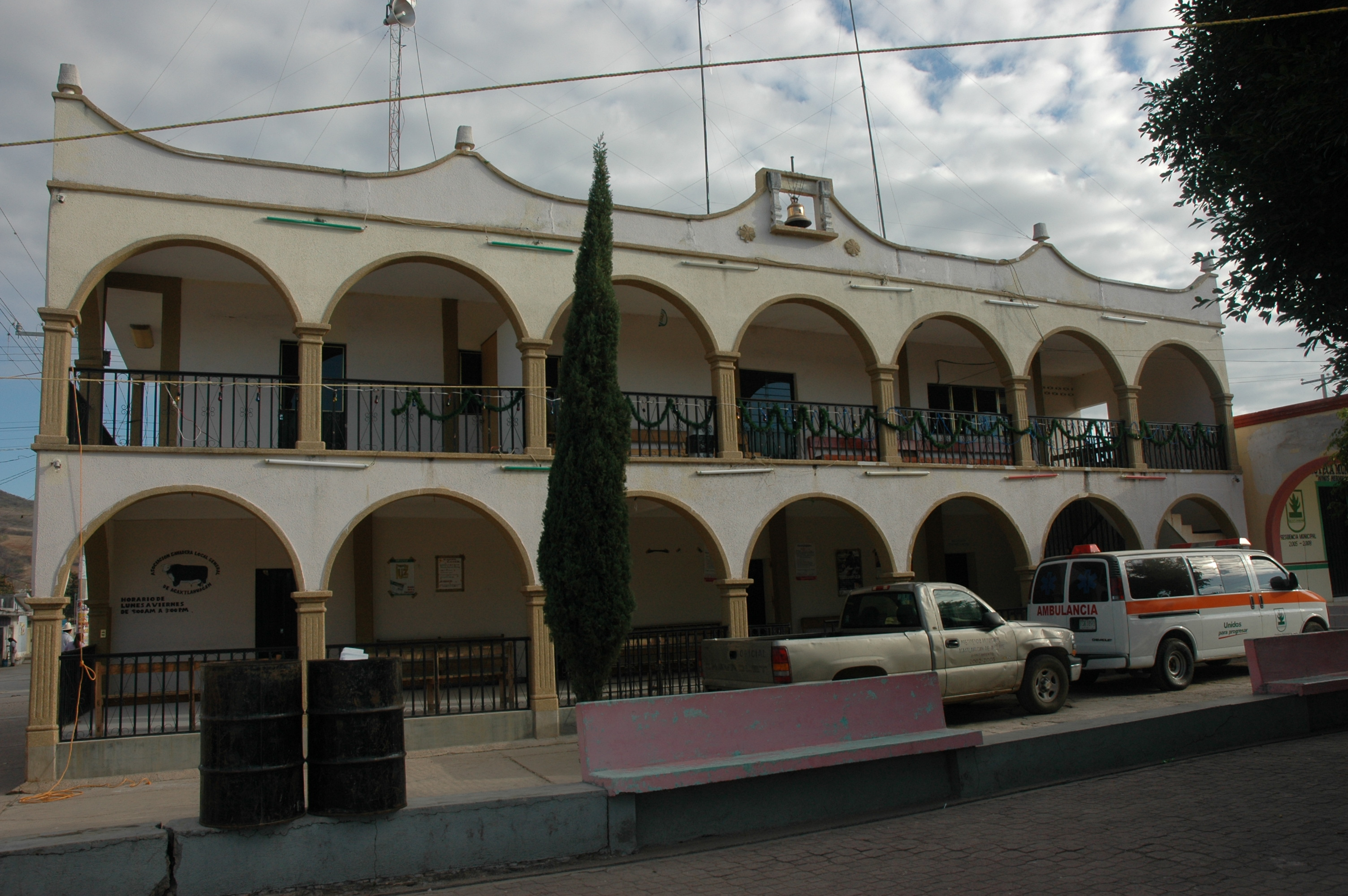 la presidencia